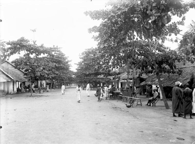 Pangani, Breite Straße